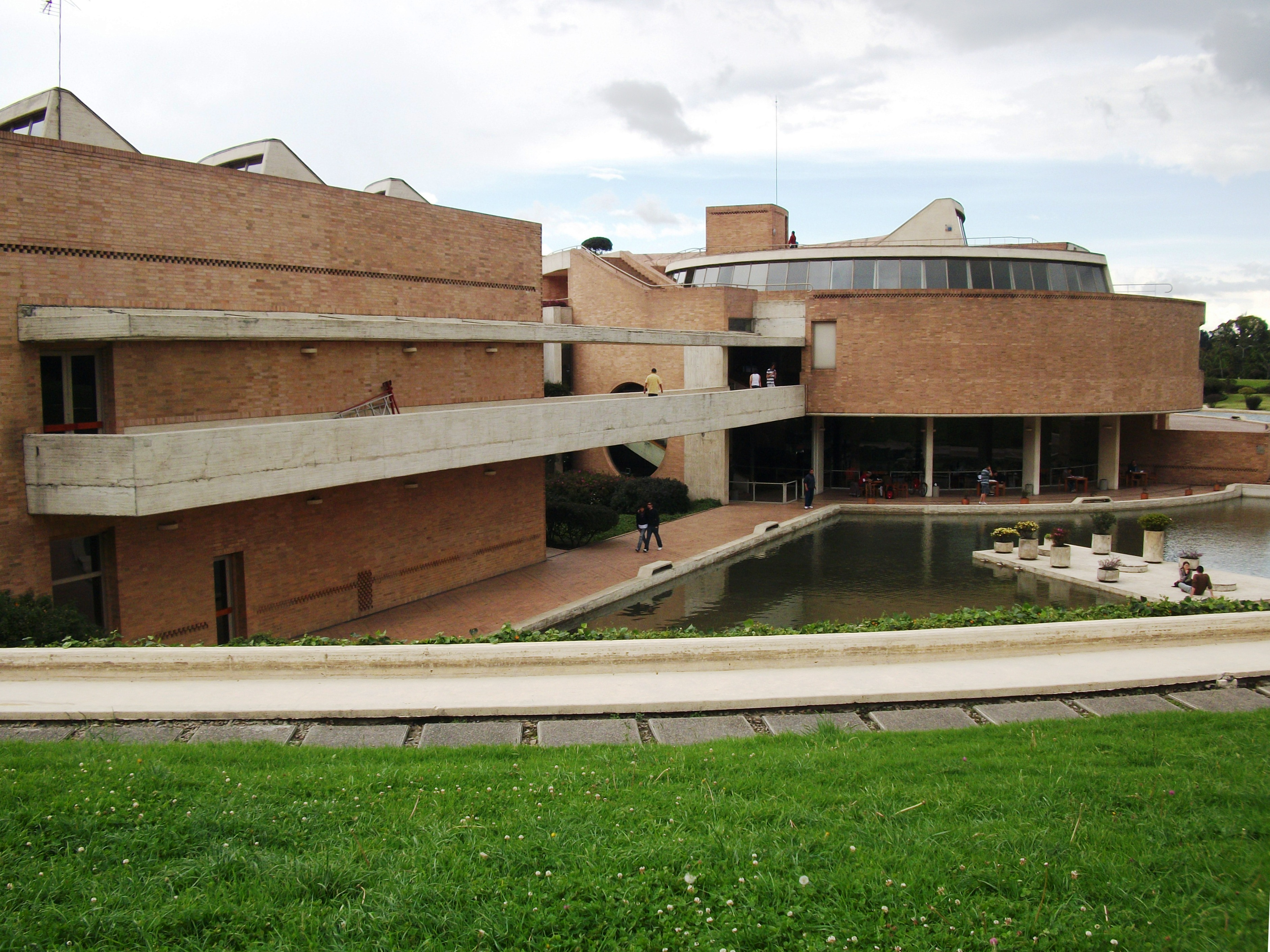 Biblioteca Virgilio Barco.